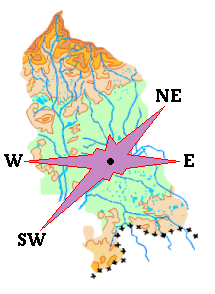 Rosace des vents dominants dans le Territoire de Belfort Tracée par F5ZV le 08/03/2006 d'après des données de Météo-France